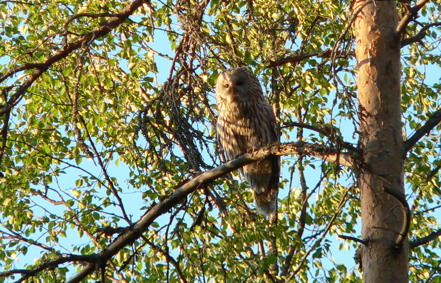 Ural Owl Strix uralensis, male, Etelä-Pohjanmaa region, Finland